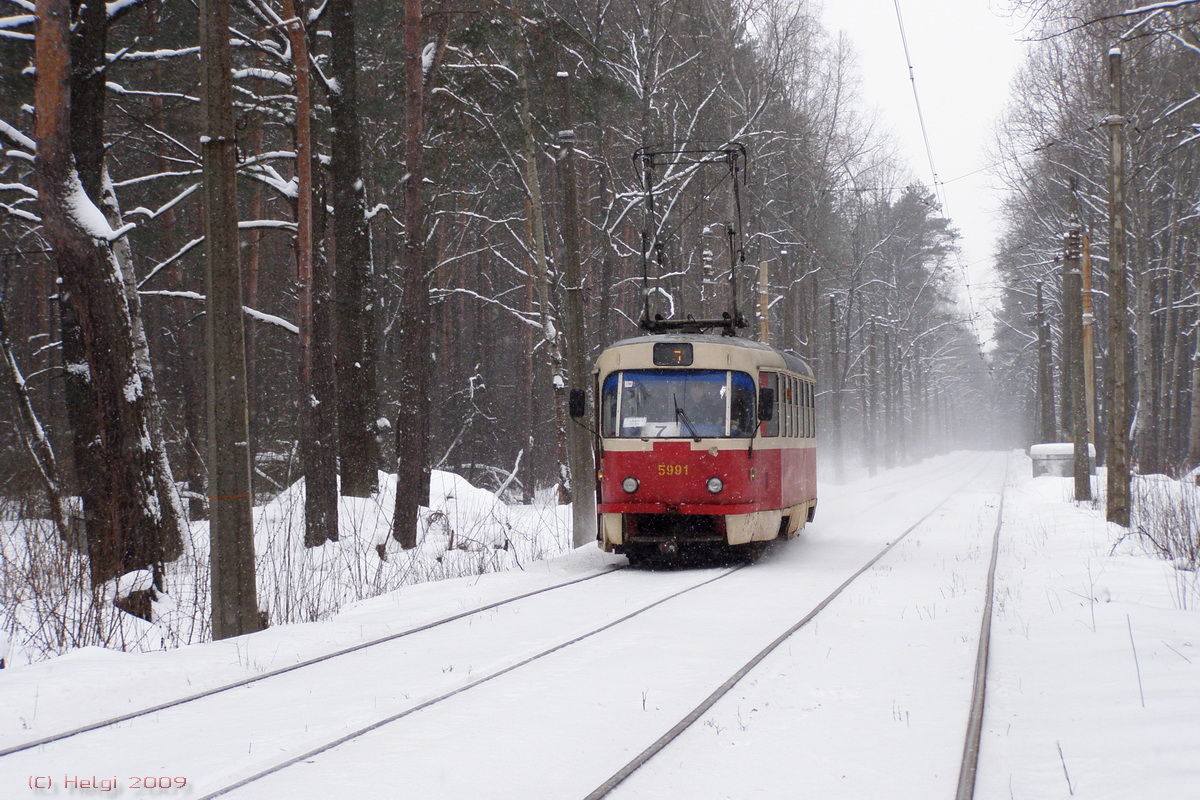 Трамвай Татра T3SU №5991 лесной массив Пуща-Водица